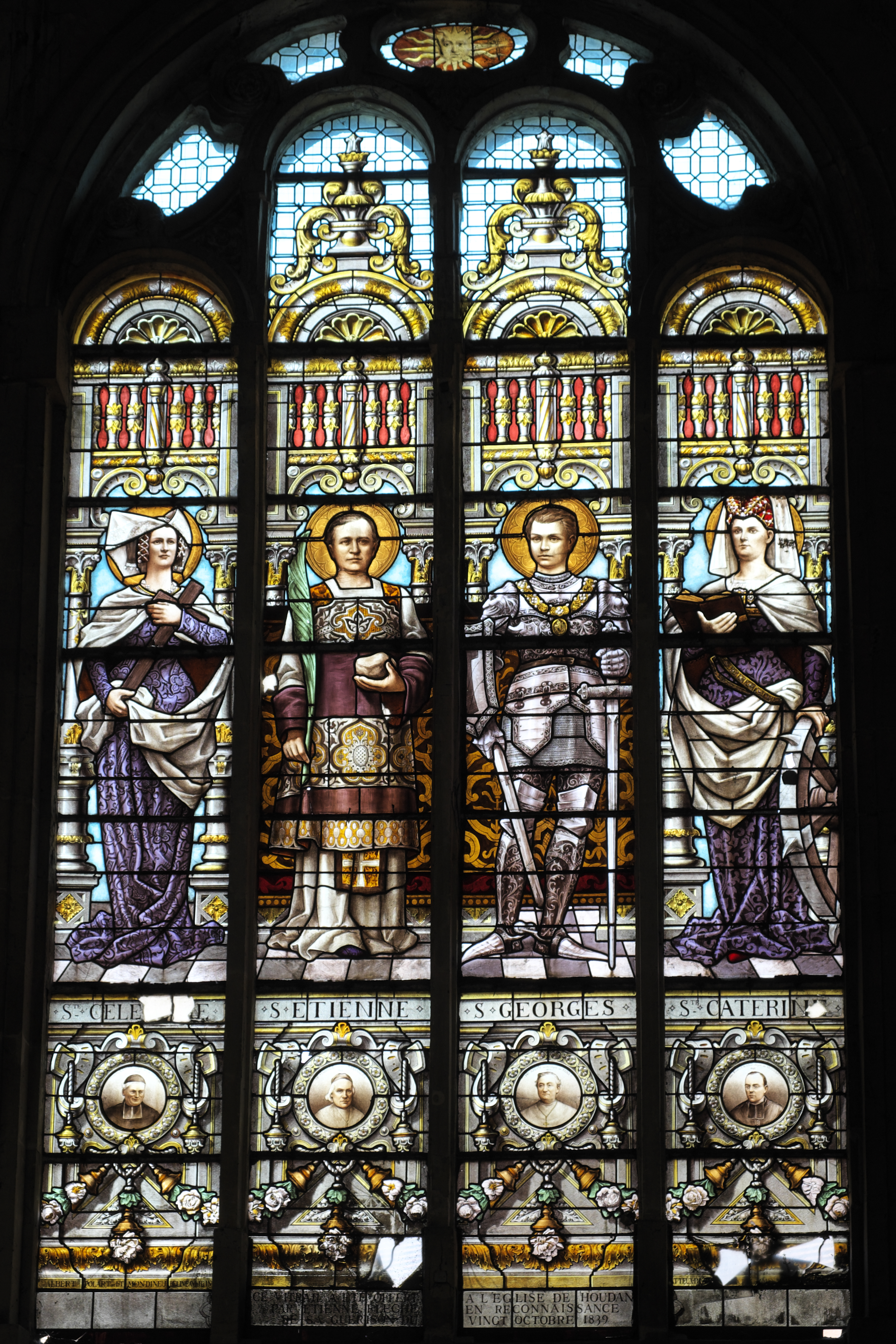 Katholische Pfarrkirche Saint-Jacques-le-Majeur et Saint-Christophe in Houdan im Département Yvelines (Île-de-France/Frankreich), Bleiglasfenster aus dem 19. Jahrhundert; Darstellung: Heilige Celestina, heiliger Stephanus, heiliger Georg, heilige Katharina; unten: Priester